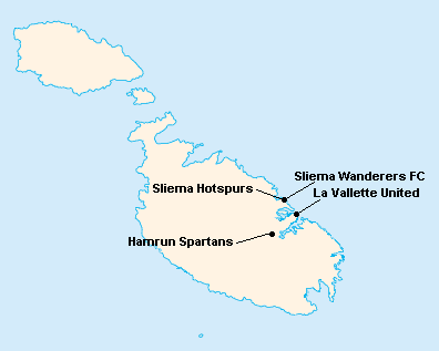 Répartition des clubs en First Division Maltaise 1931-1932.